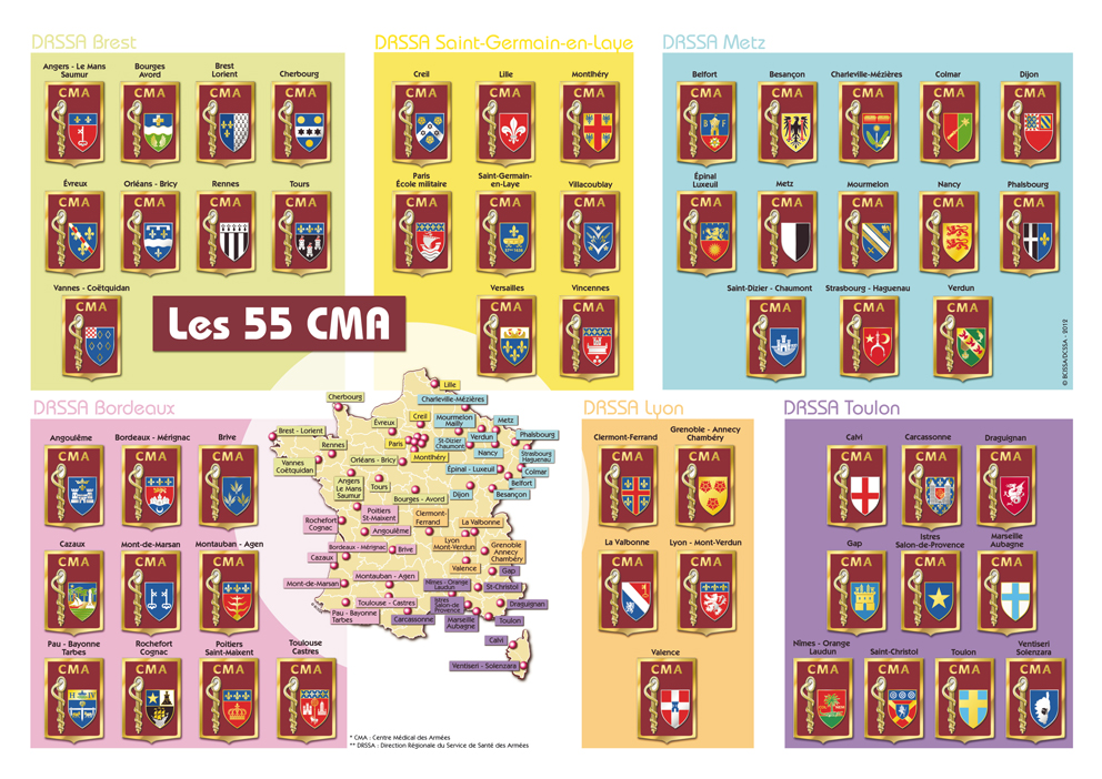 Carte de l'ensemble des unitées du SSA